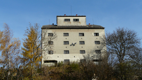 Sýpka za lékárnou v Konici